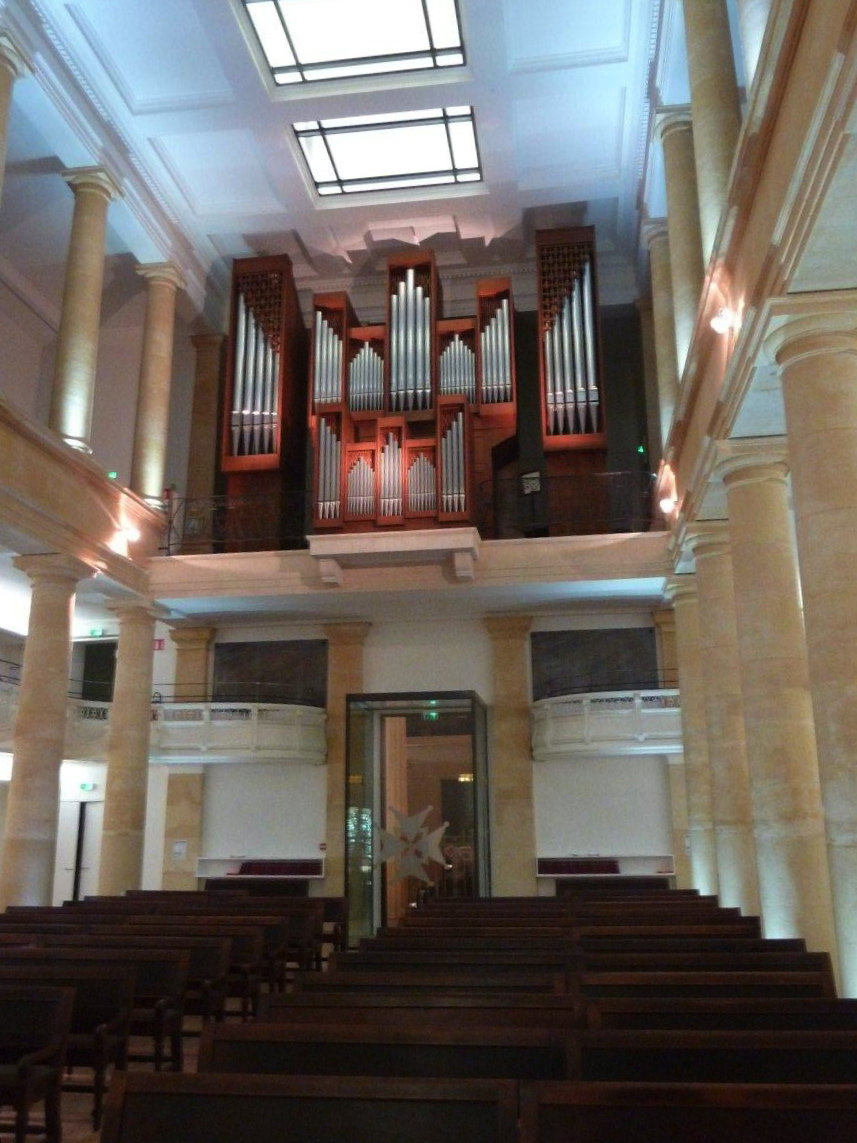 Orgue